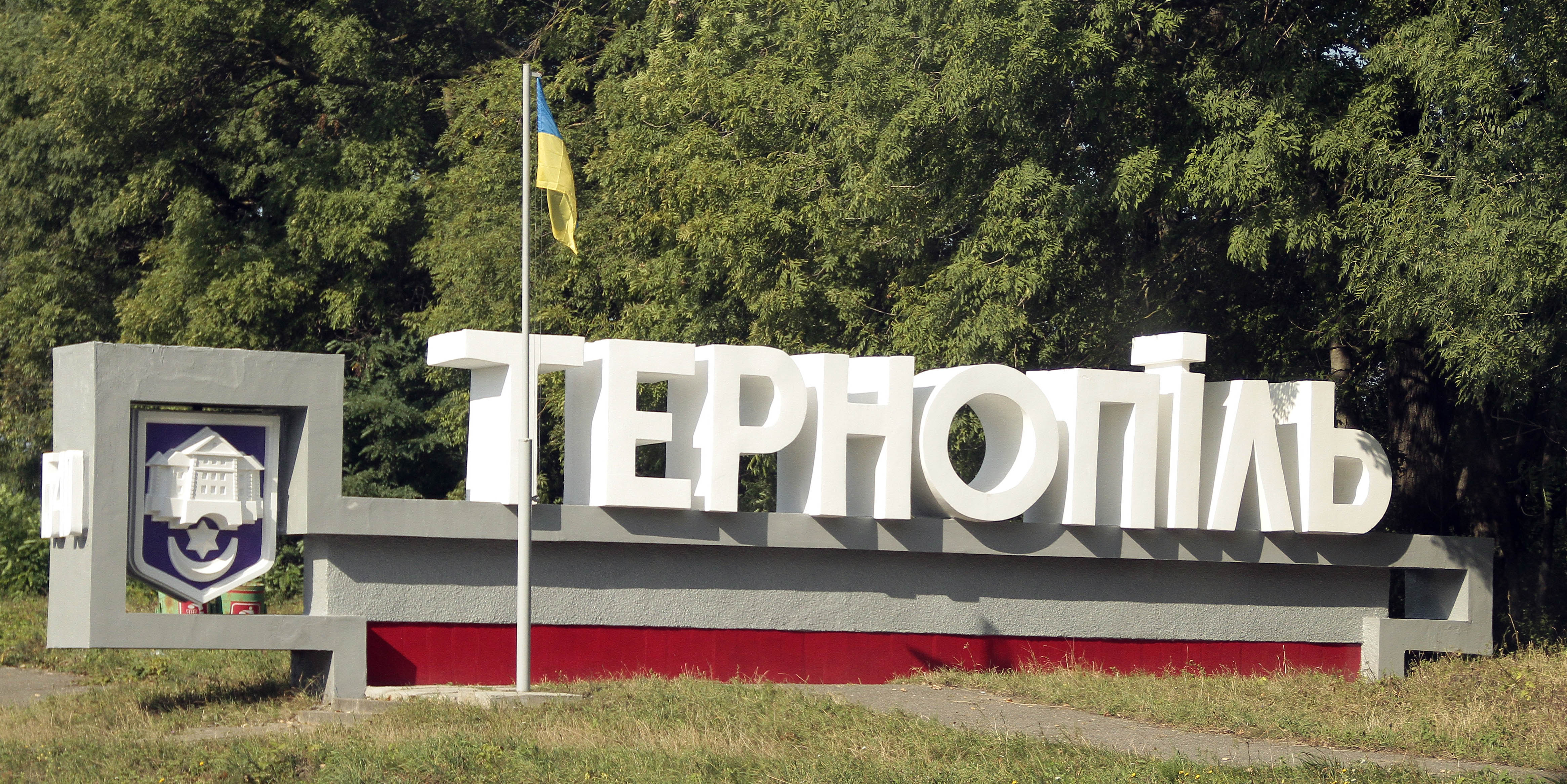 Указатель города Тернополь